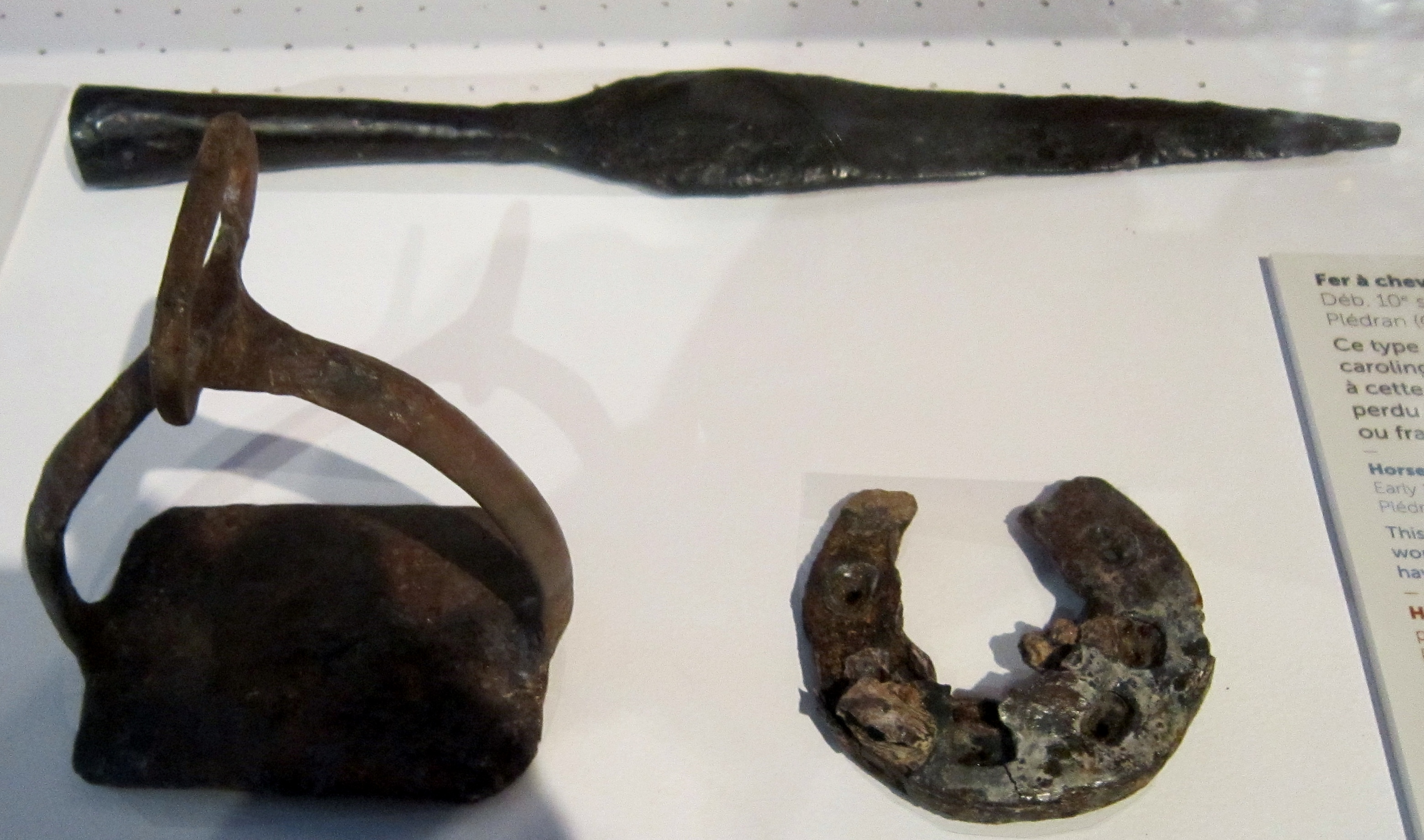 Fer de lance, étrier et fer à cheval datant de l'époque carolingienne trouvés dans le camp de Péran en Plédran ((exposé au musée de l'abbaye de Landévennec lors de l'exposition temporaire "La Bretagne au temps des rois" en 2018)).